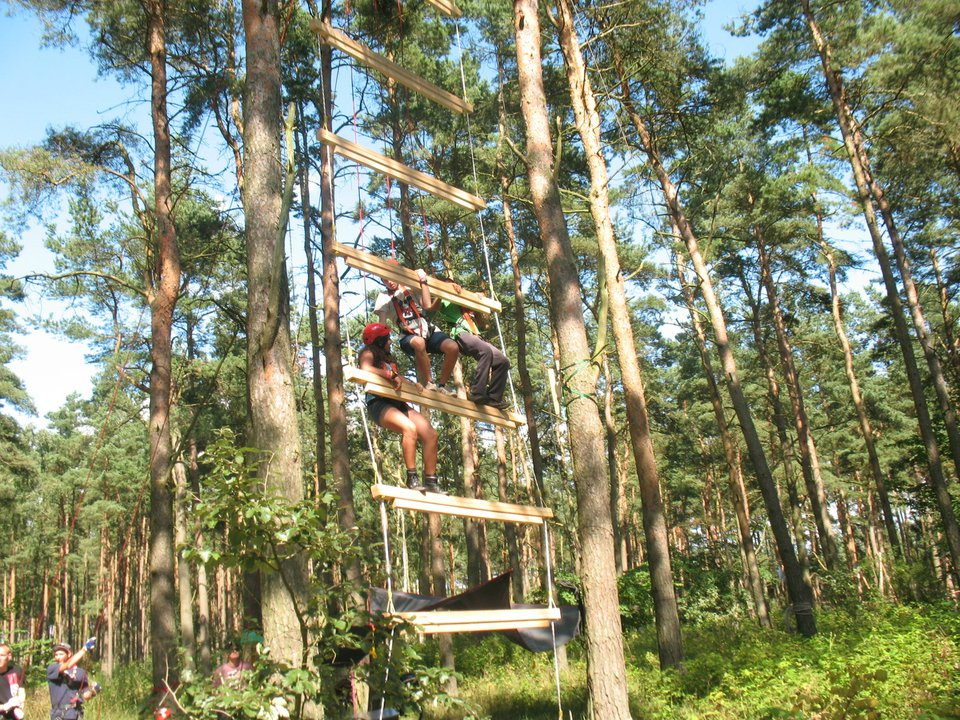 חברי המשלחת הישראלית בעת טיפוס על סולם המצריך שיתוף פעולה כדי להגיע למעלה.